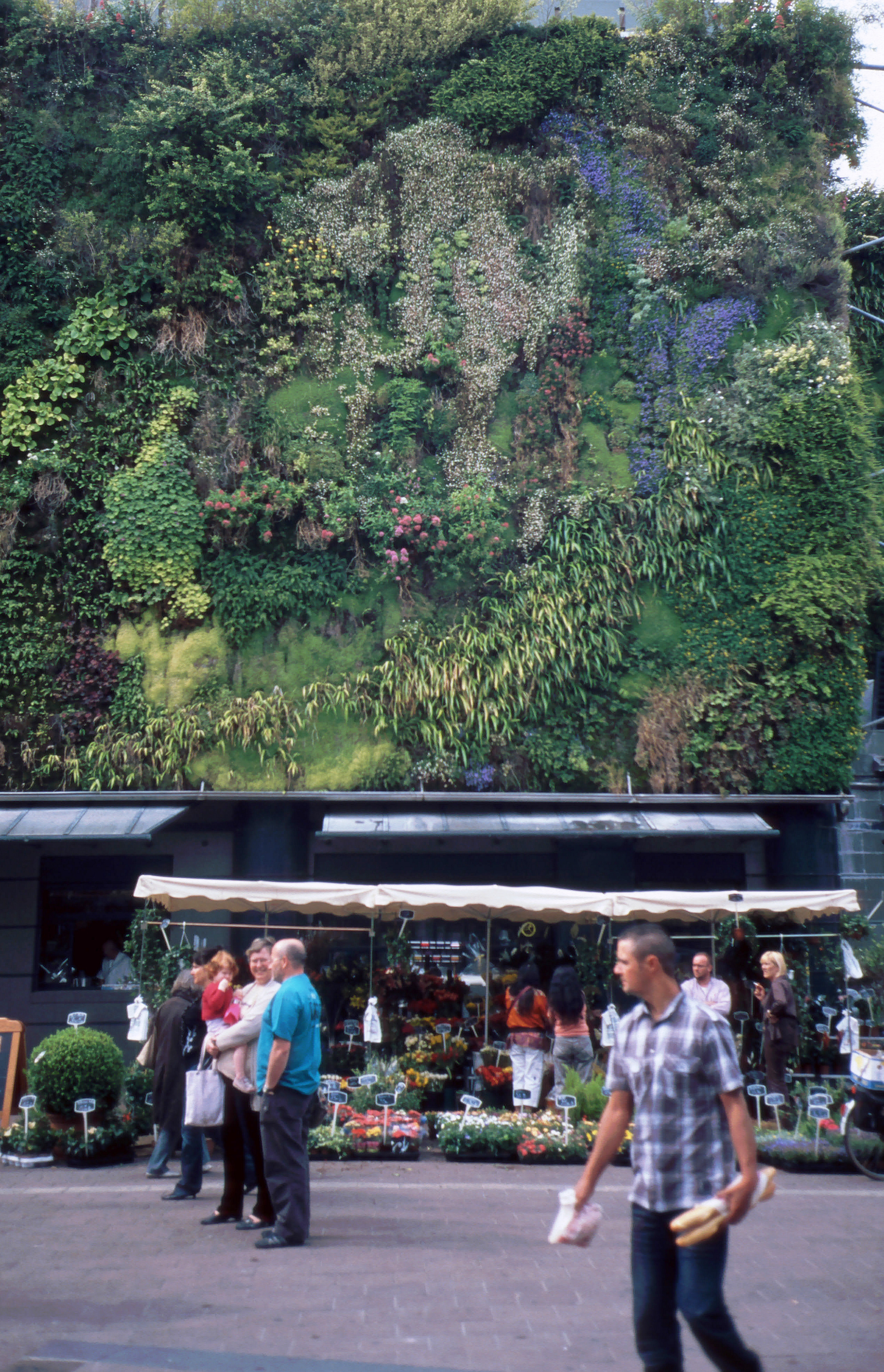 Marché sur la place Pie devant les Halles d'Avignon